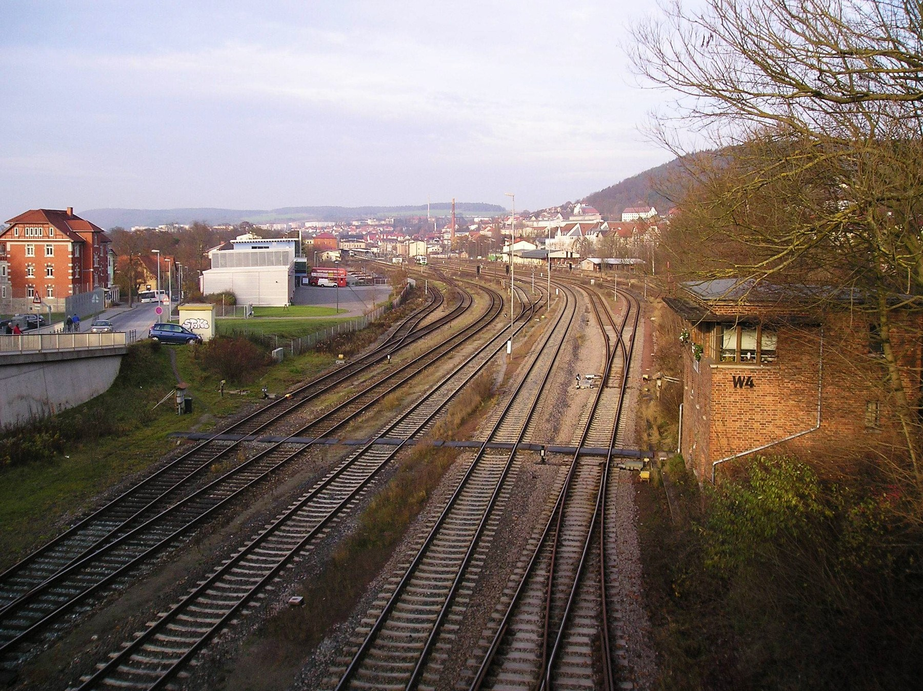 Das südliche Bahnhofsgelände mit Stellwerk 4, links die Stützpunktfeuerwehr auf einem Teil des Bayerischen Bahnhofs.